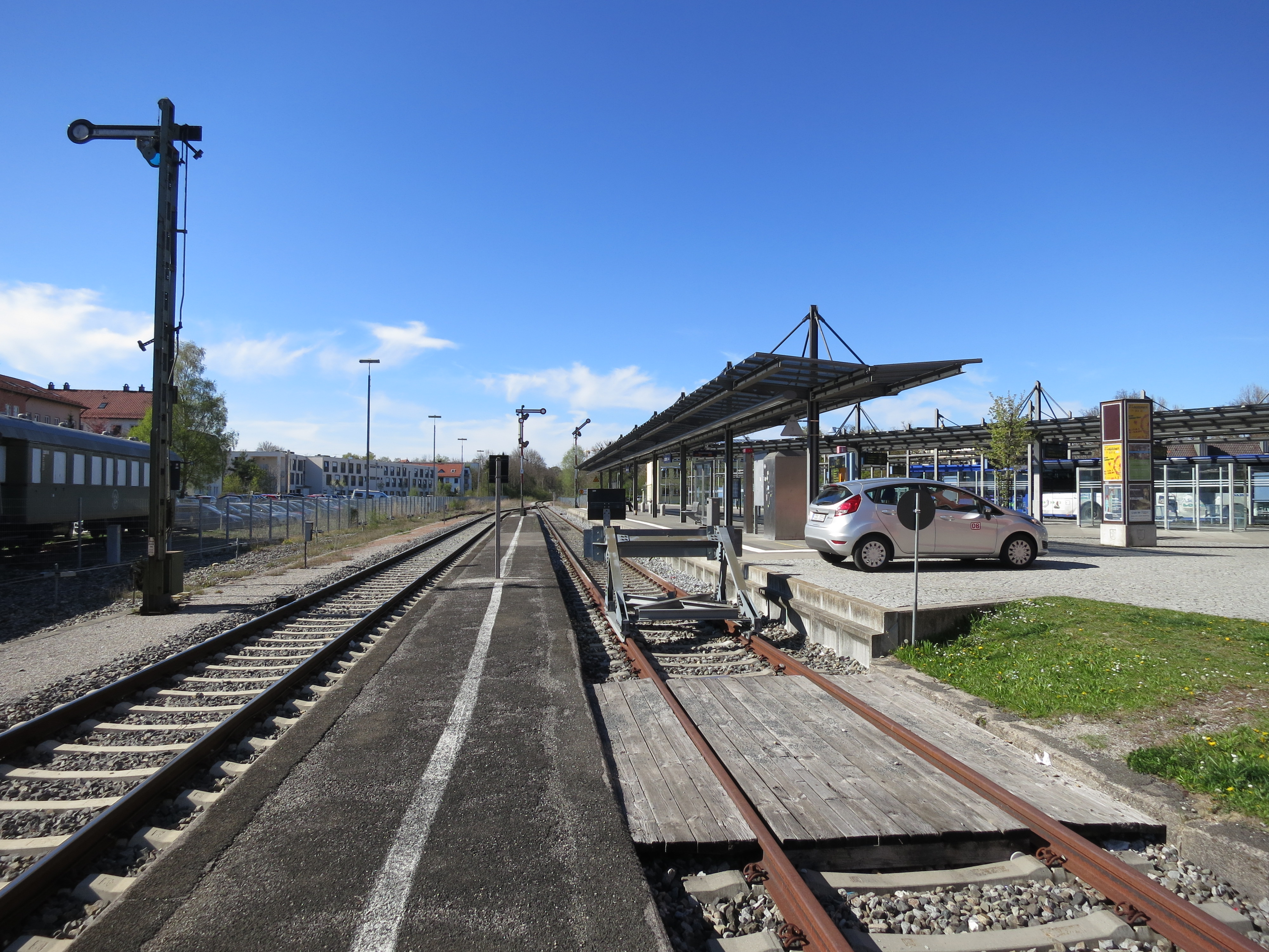 Bahnsteige des Bahnhofs Landsberg (Lech) mit Formsignalen, links der Zwischenbahnsteig für die Züge der Fuchstalbahn, rechts der erhöhte Hausbahnsteig für die Triebwagen der Lechfeldbahn